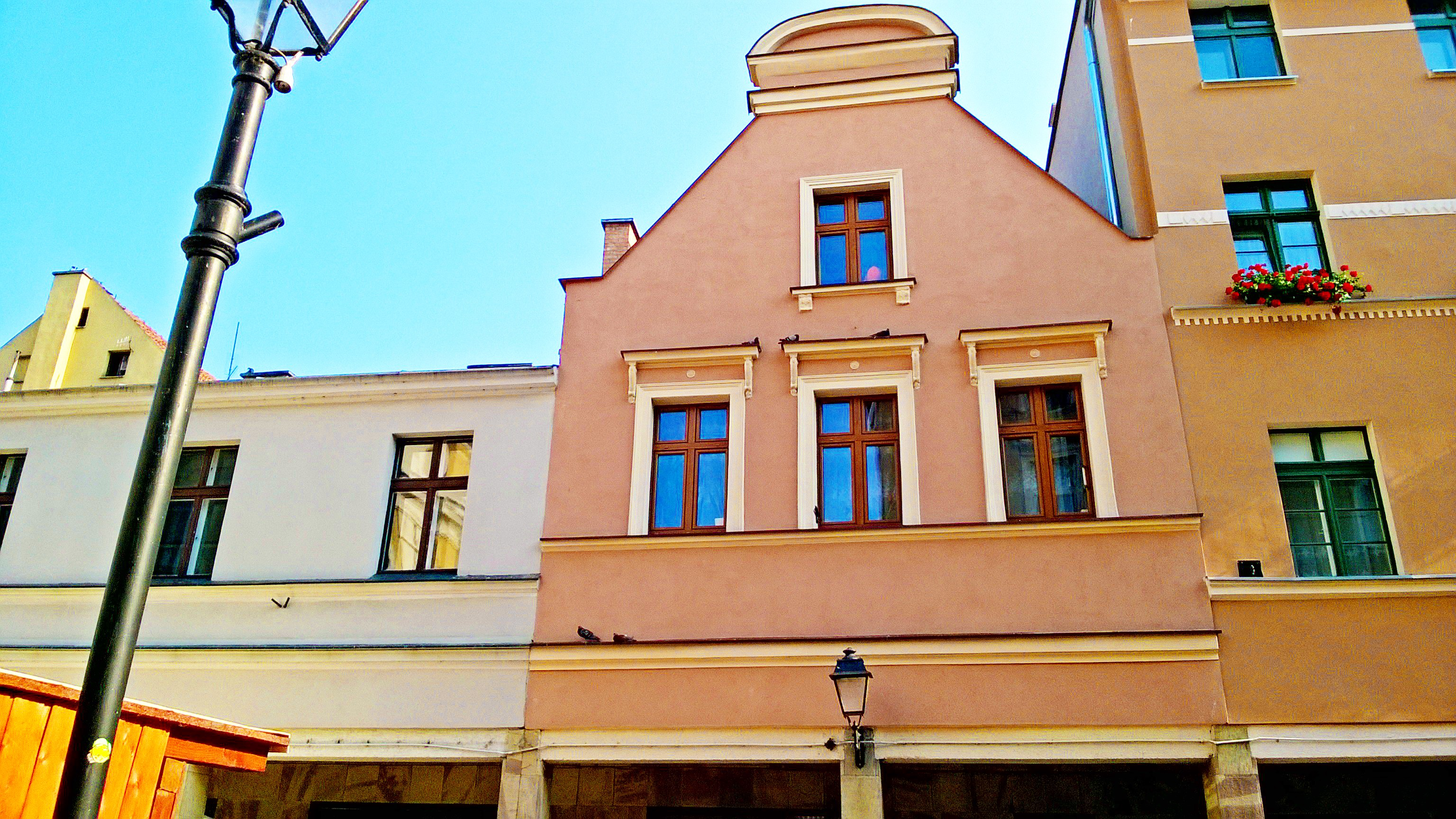 Mała Galeria Fotografii w Toruniu